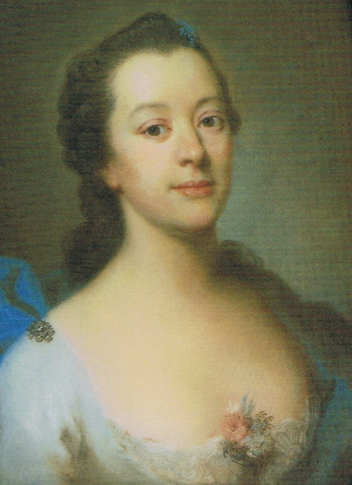 Magdalena Sibylla of Neidschutz (1675-1694), Gräfin von Rochlitz